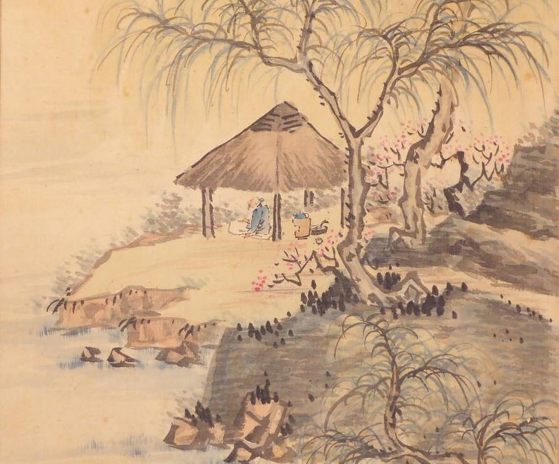 Detail of Hanging scroll of a landscape 1